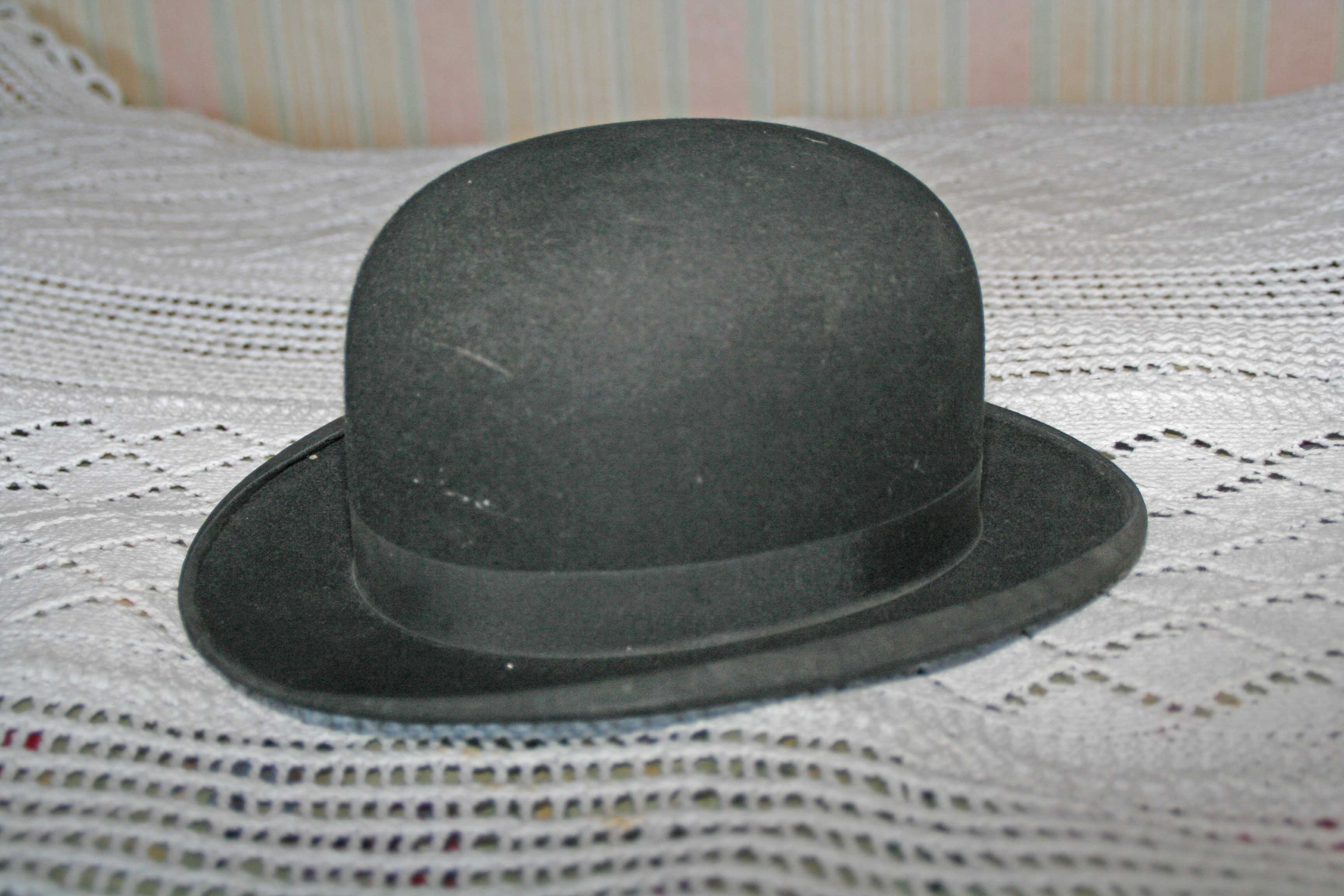 Meloun.